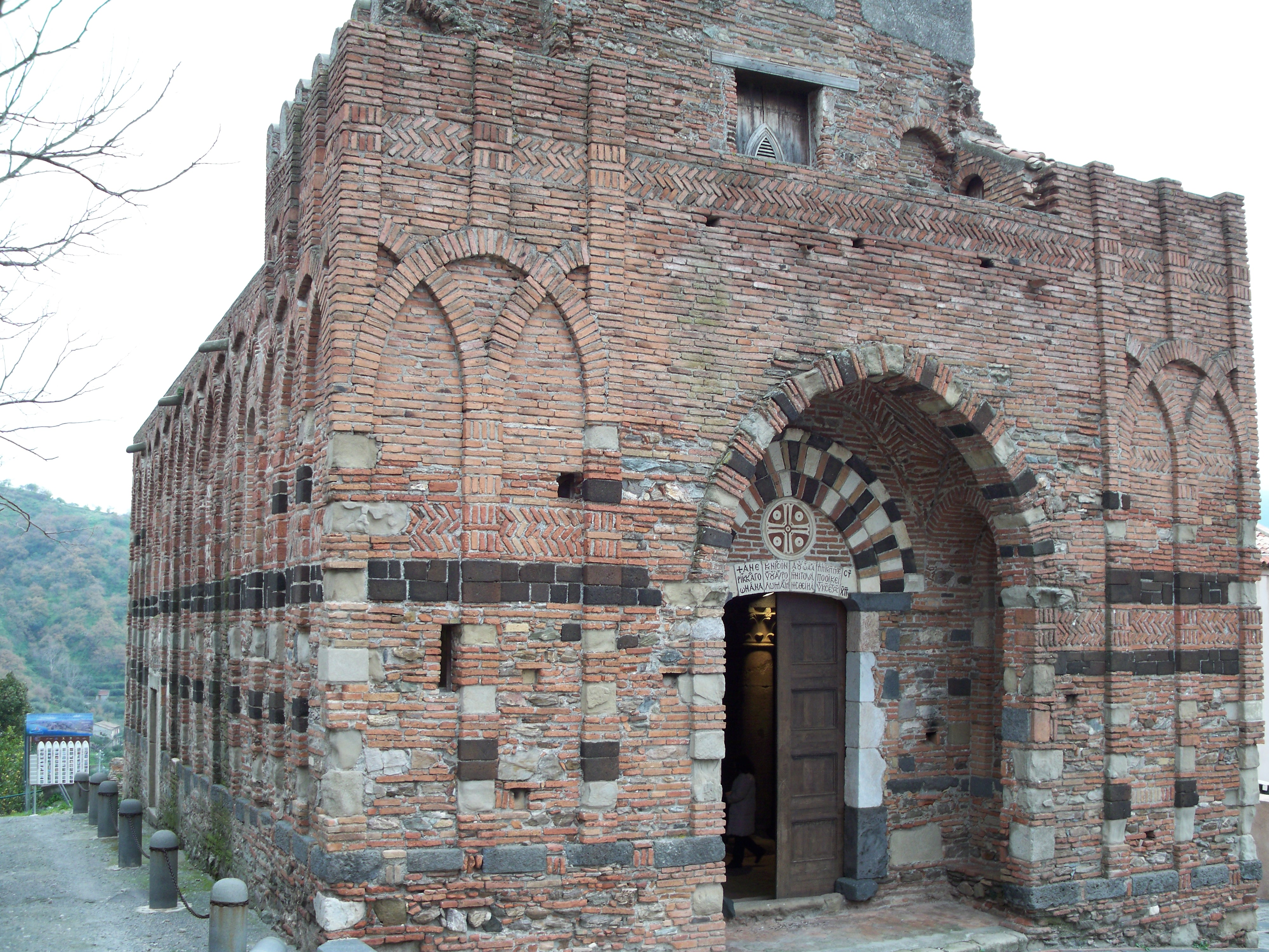 Prospetto della chiesa normanna dei SS Pietro e Paolo di Casalvecchio Siculo. (Sicilia) (XII sec.Several rows of decorative opus spicatum can be seen in the front wall)